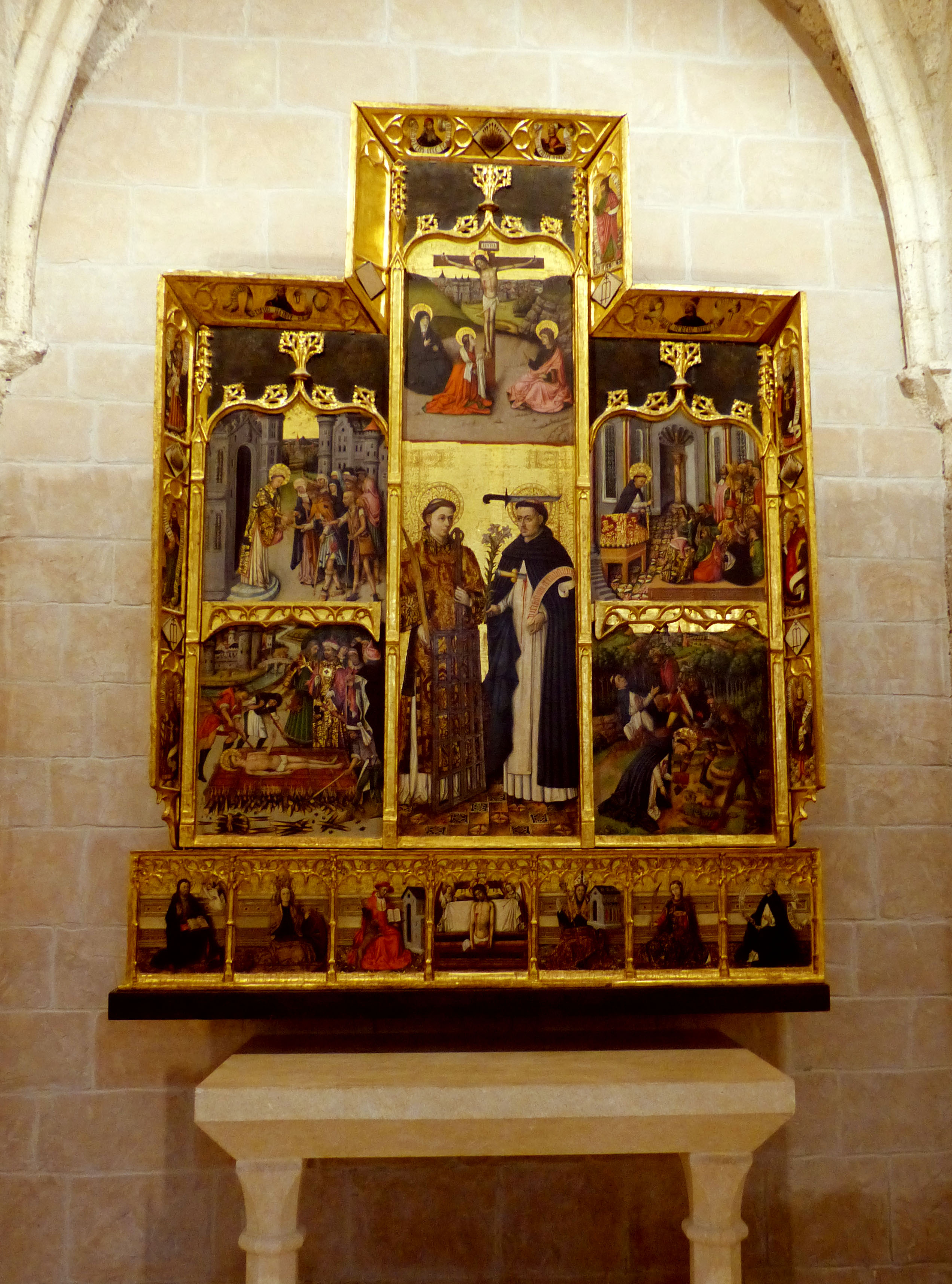 Parroquia de Catí. Retablo de Joan Reixach